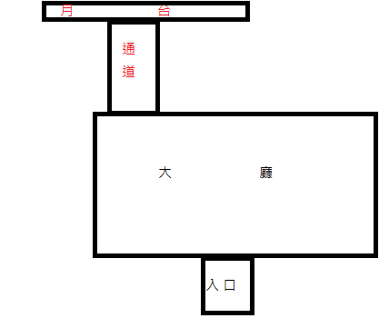 分離式月台基礎平面圖